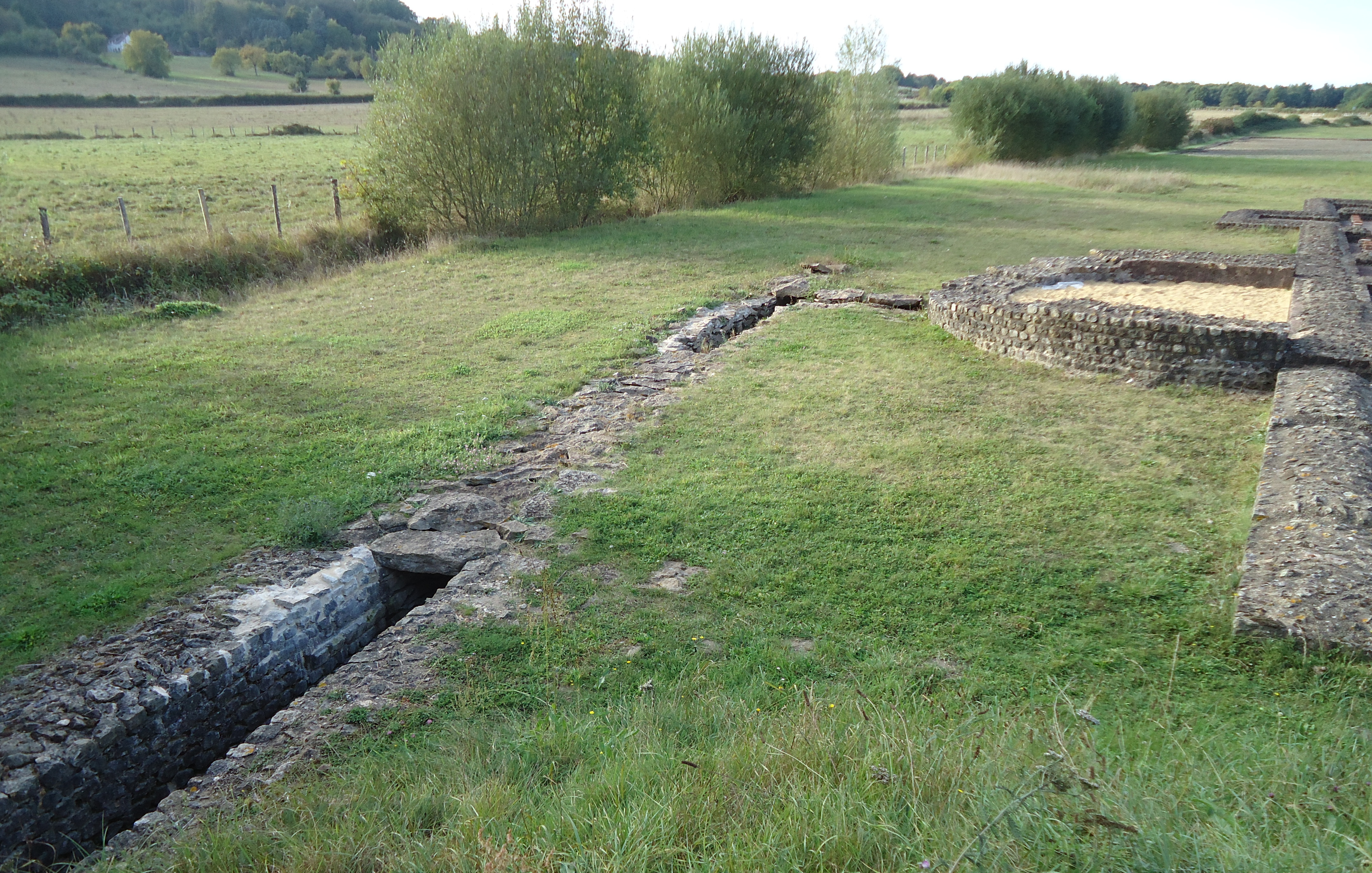 Le réseau hydraulique des thermes - Site archéologique de Cherré - Aubigné-Racan - Sarthe (72)